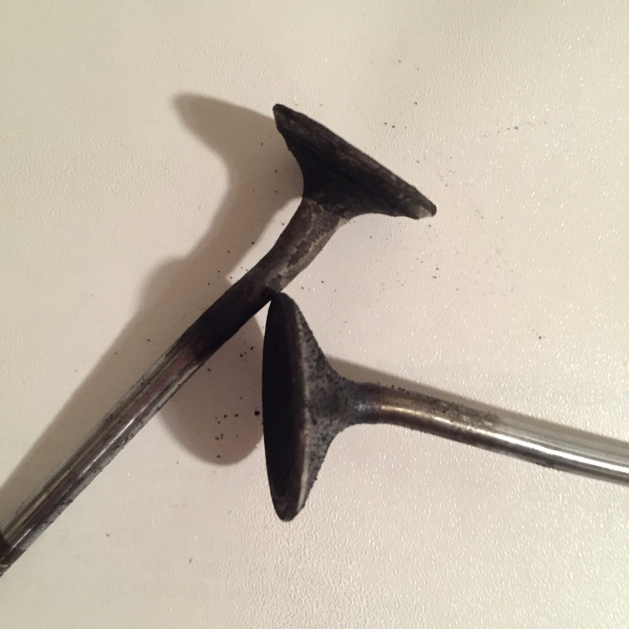 verbogene Ventile nach Kolbenaufschlag durch Riß Steuerkette; Motor Z22SE